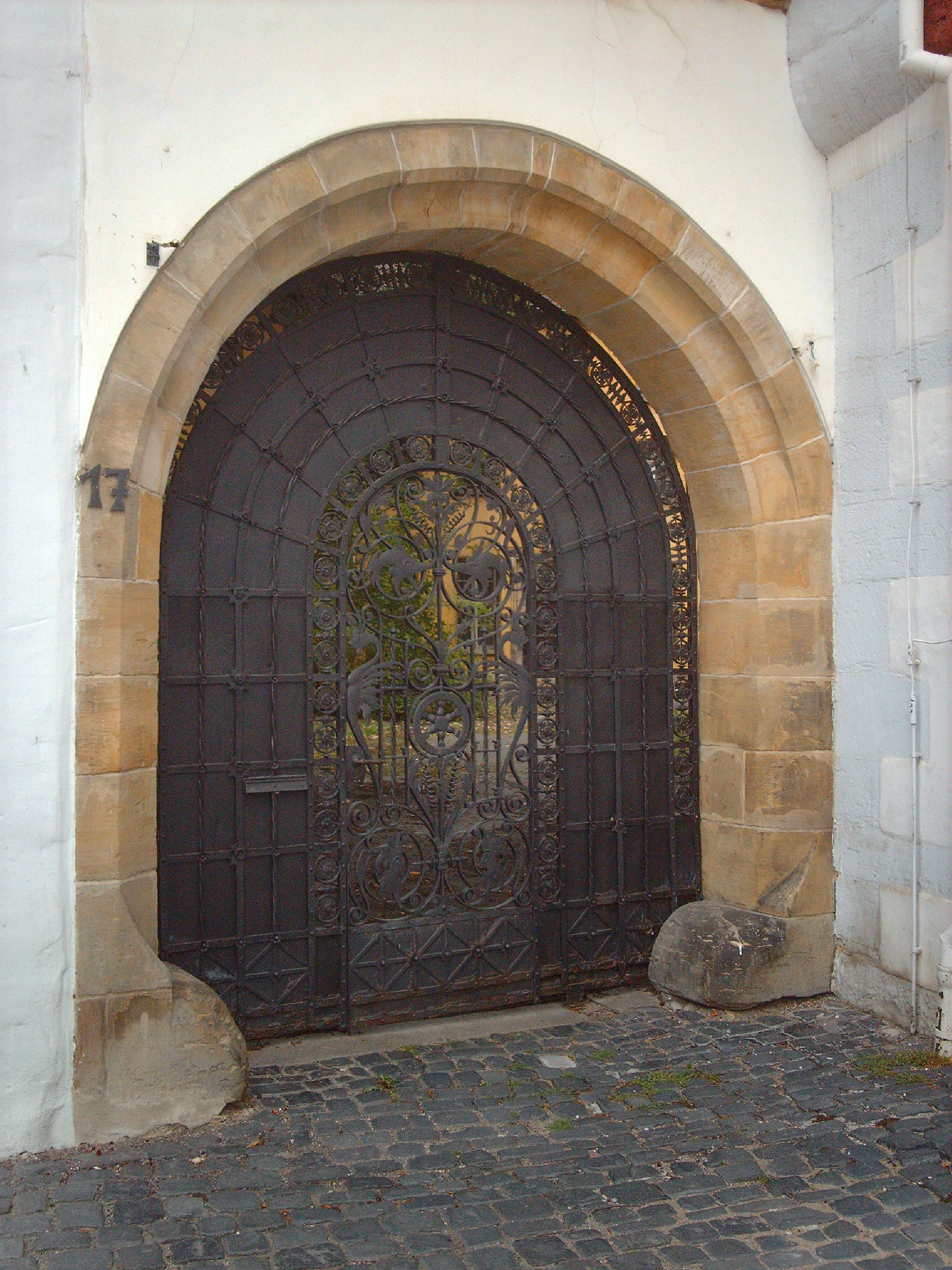 Eingangstor zum Haus zum Turnier in der Turniergasse 17 in Erfurt.